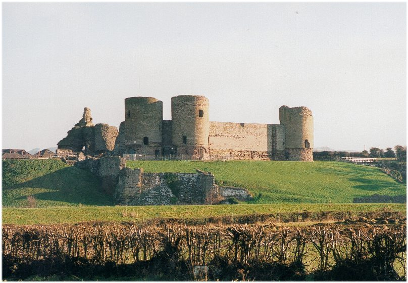 Castell Rhuddlan